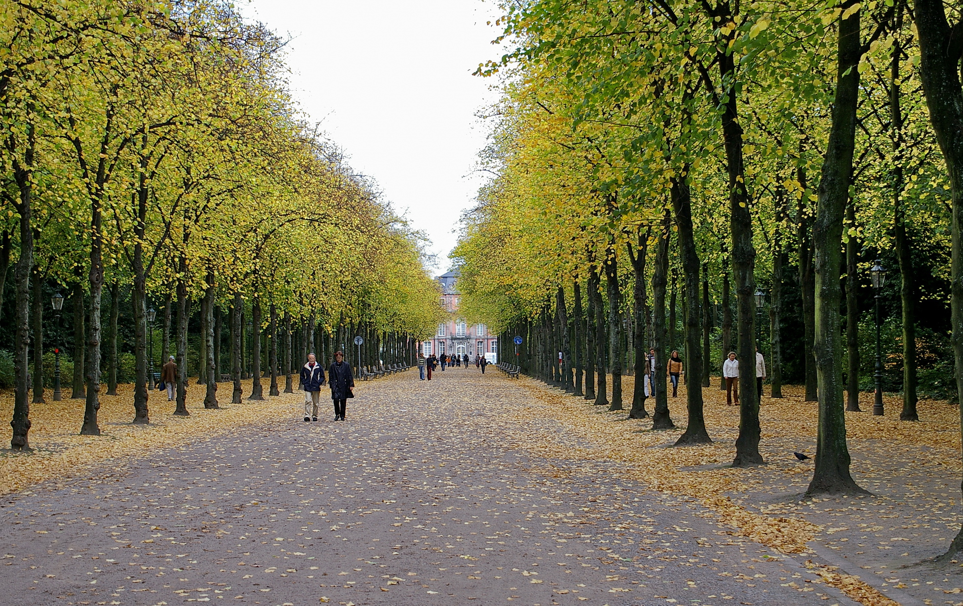 Die Reitallee im Hofgarten in Düsseldorf, zulaufend auf das Schloss Jägerhof